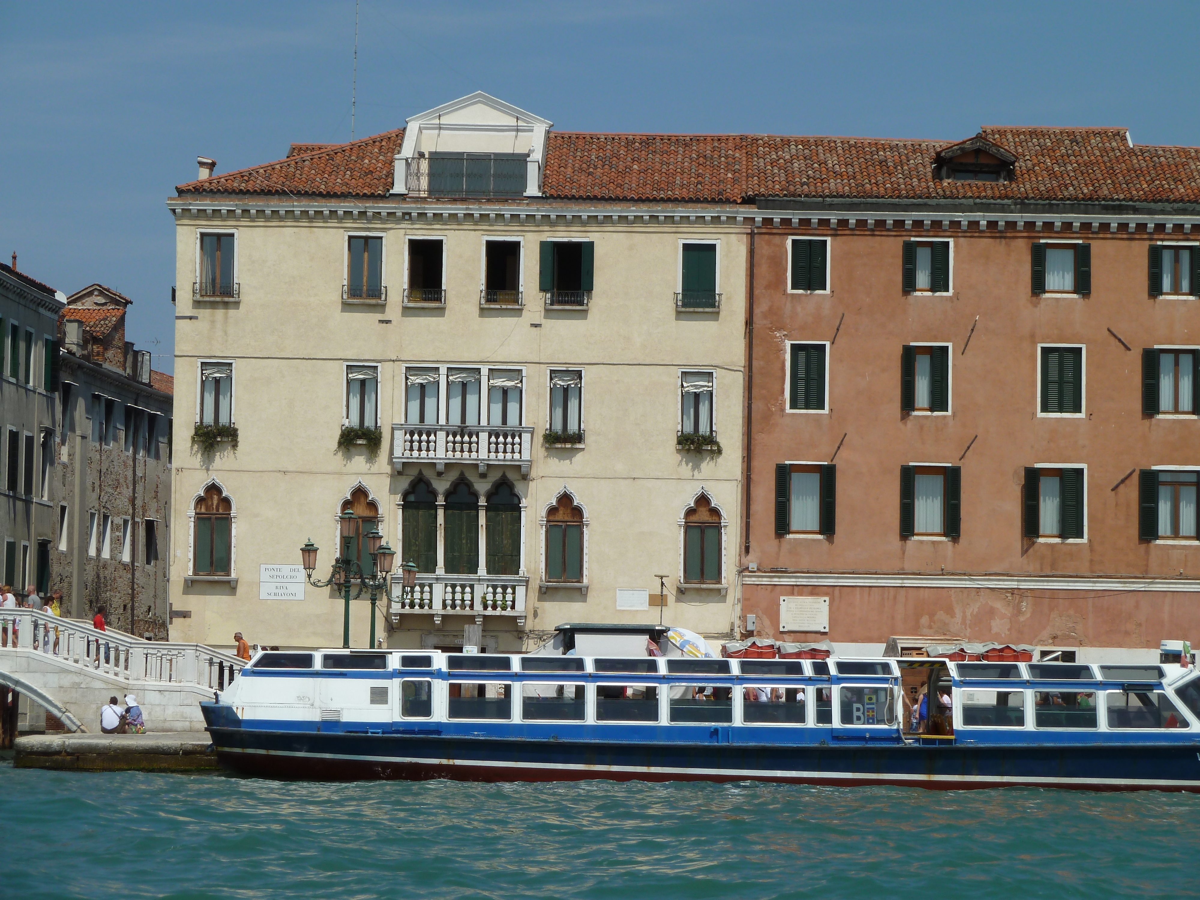 Pal molina o navagero